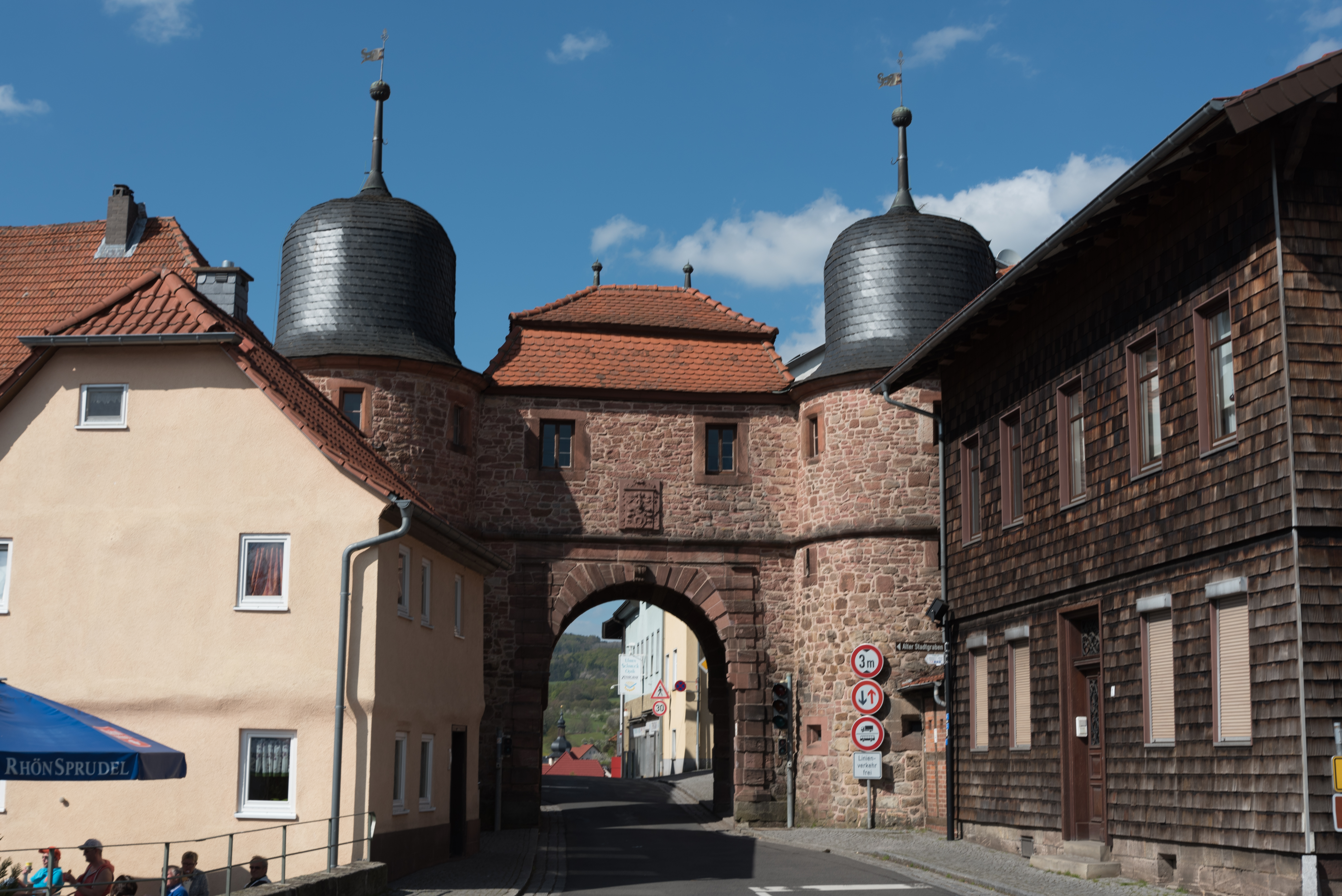 Tann (Rhön), Stadttor